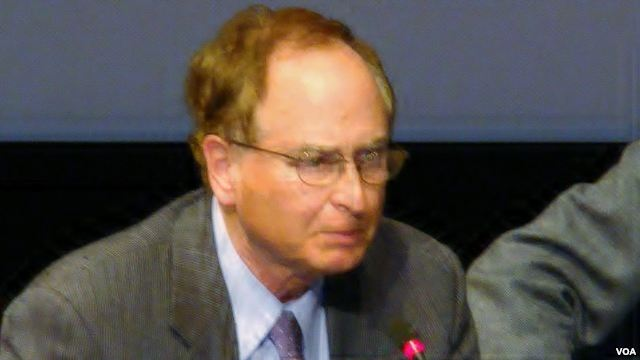 Fox Butterfield